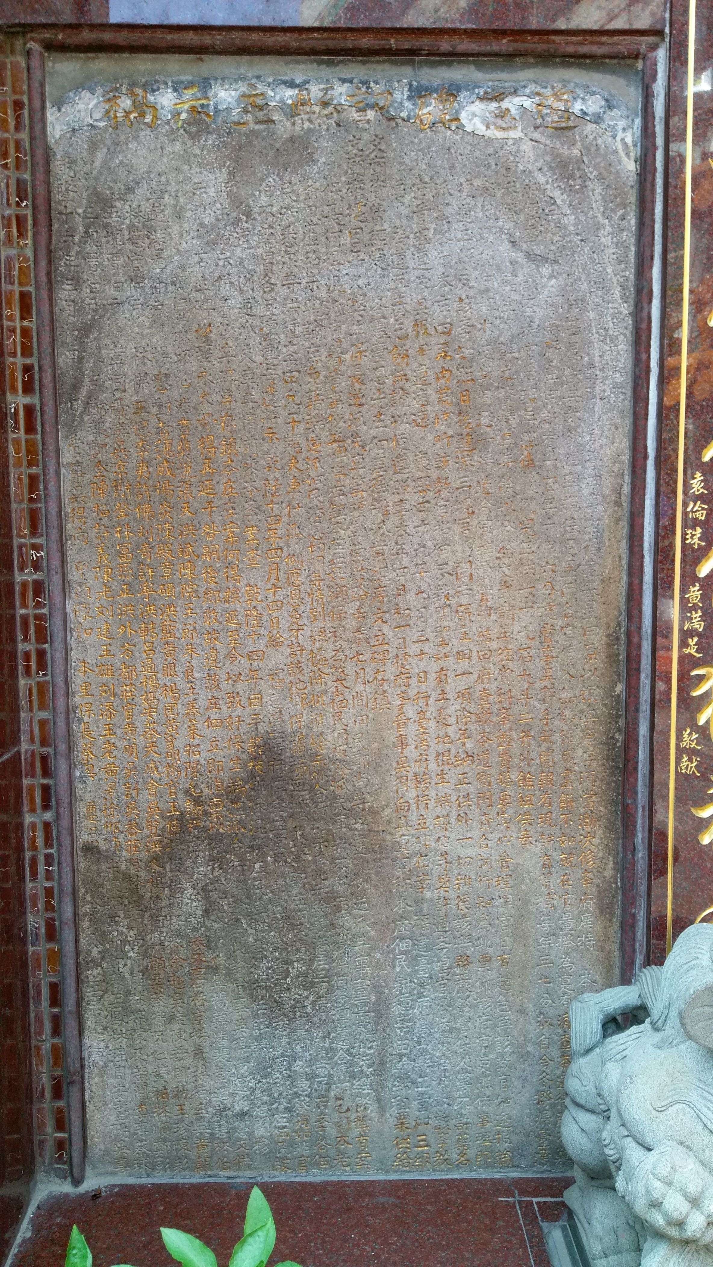 中文（台灣）: 高雄站前保安宮（舊大港保安宮）「道憲碑記縣主示稿」古碑